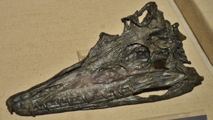 Fossil of Diandongosuchus, an extinct reptile- Picture at Bejing Museum of Natural History